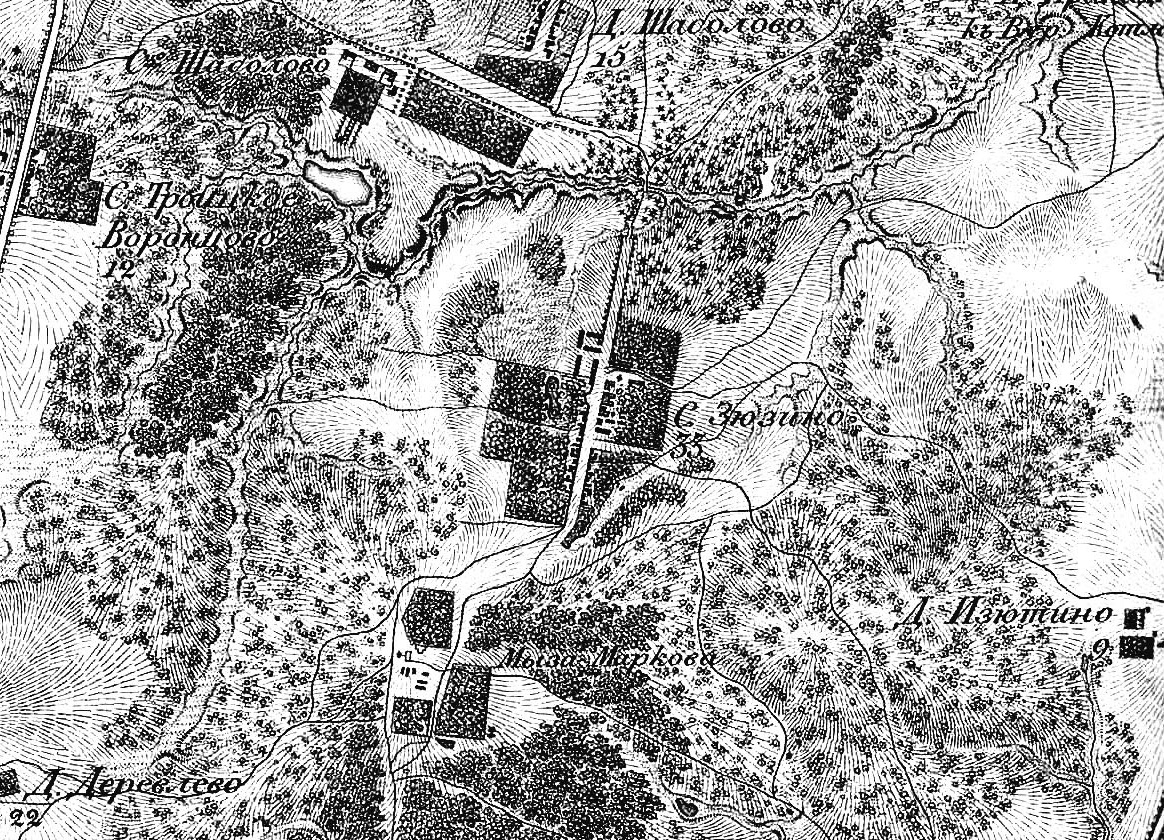 Топографическая карта окружности Москвы, 1818 год, фрагмент: Зюзино